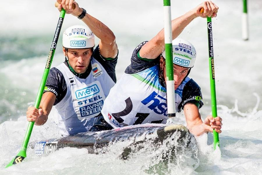 Luka Božič in Sašo Taljat